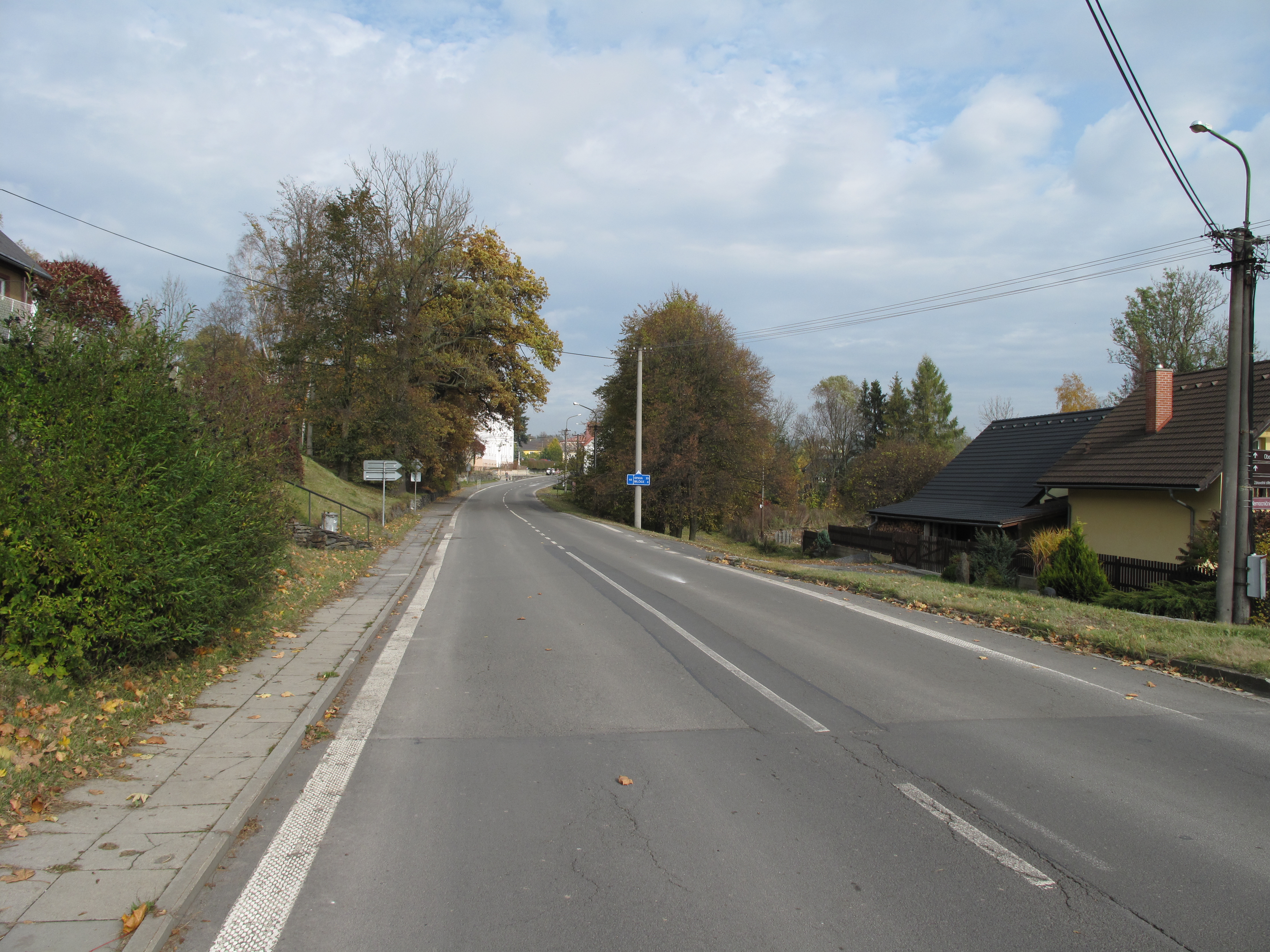 Dvorce (okres Bruntál). Okres Bruntál, Česká republika.